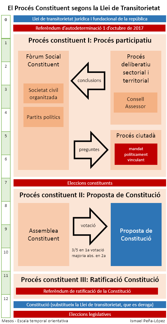 Esquema dels procediments relatius al procés constituent segons el que descriu la Llei de transitorietat jurídica i fundacional de la República segons el professor Ismael Peña-López